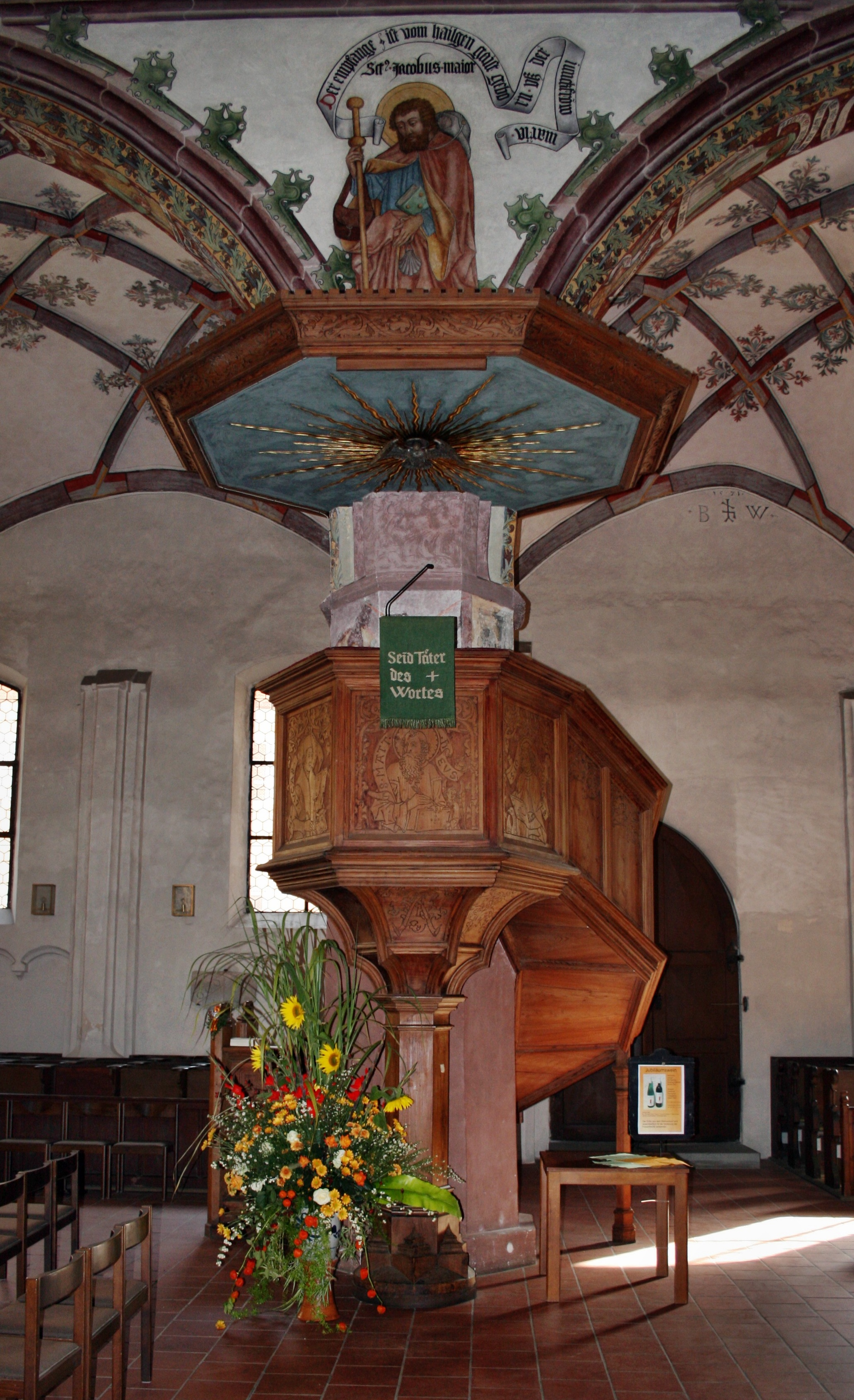 Unser Frauen (Memmingen), Kanzel aus dem 19. Jahrhundert und Fresken um 1460 aus der Memminger Schule